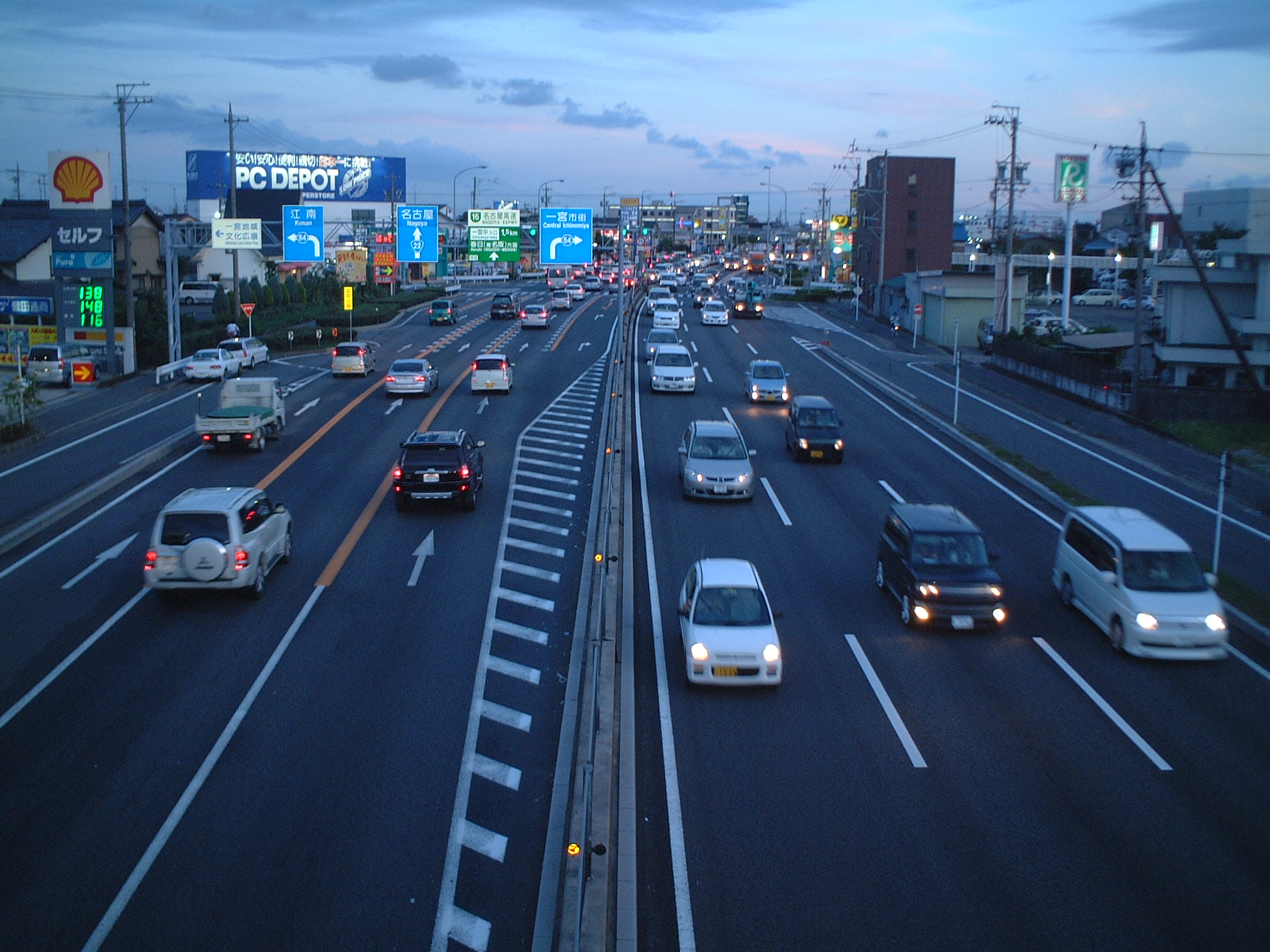 W:ja:国道22号の画像